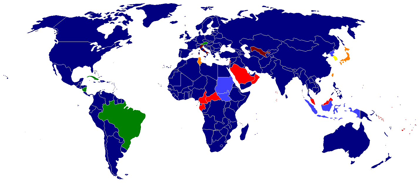 Voting age